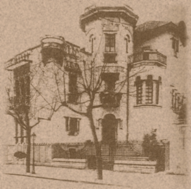 Villa Avena, costruita nel 1910 dall'architetto Adolfo Avena come propria residenza, in Via Luca Giordano 19; demolita negli anni '50.